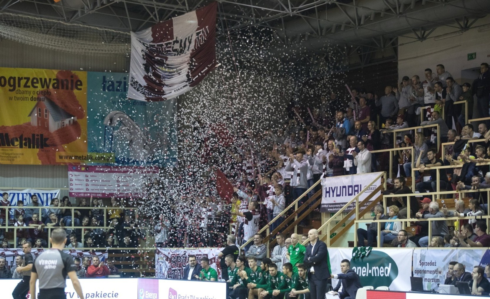 Klub kibica podcza meczu Spójnia Stargard-Legia Warszawa (17.11.2018)